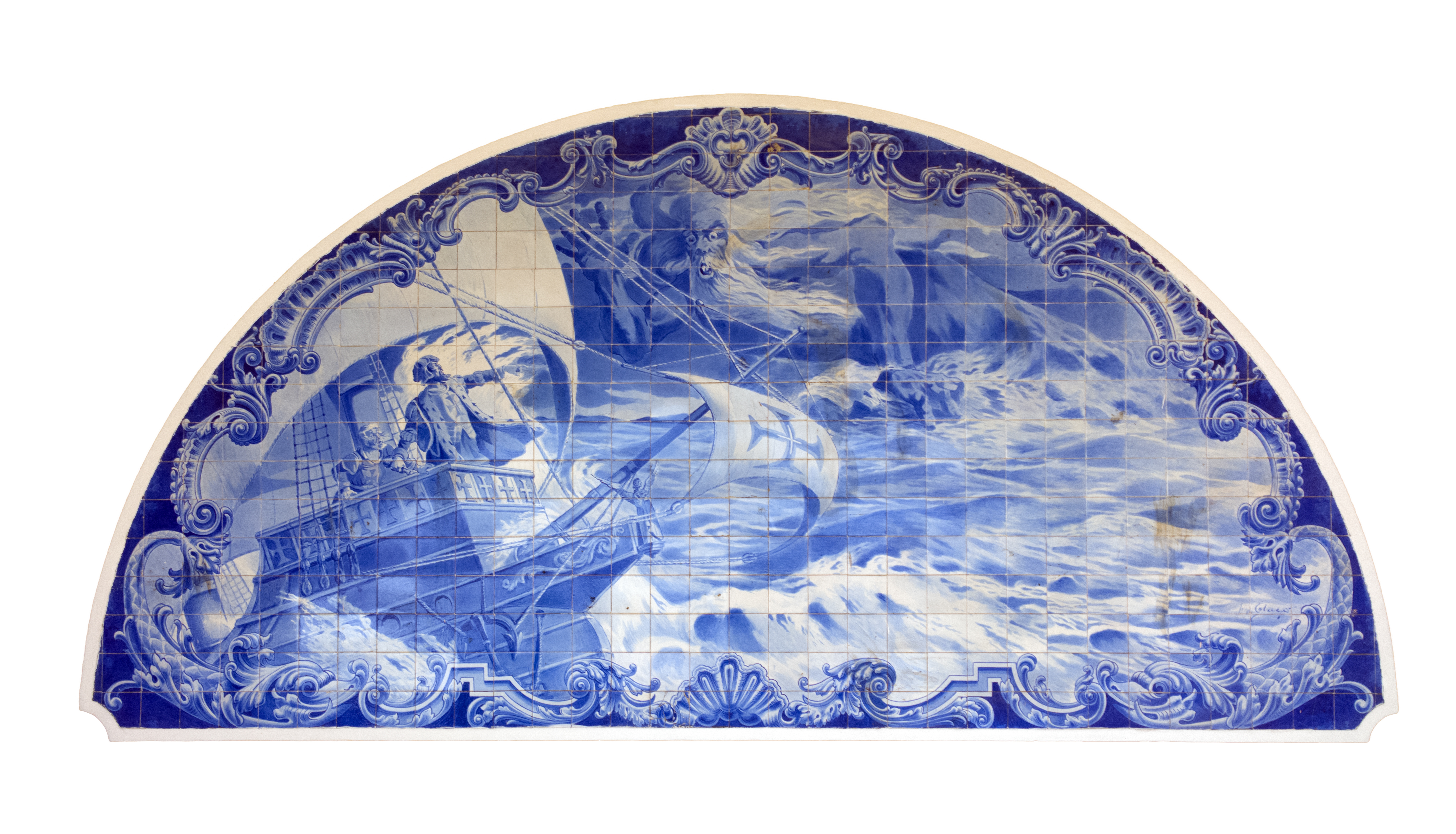 Painel de azulejos de Jorge Colaço decora a entrada principal do Estádio Vasco da Gama, do clube de futebol de mesmo nome, no Rio de Janeiro, Brasil.